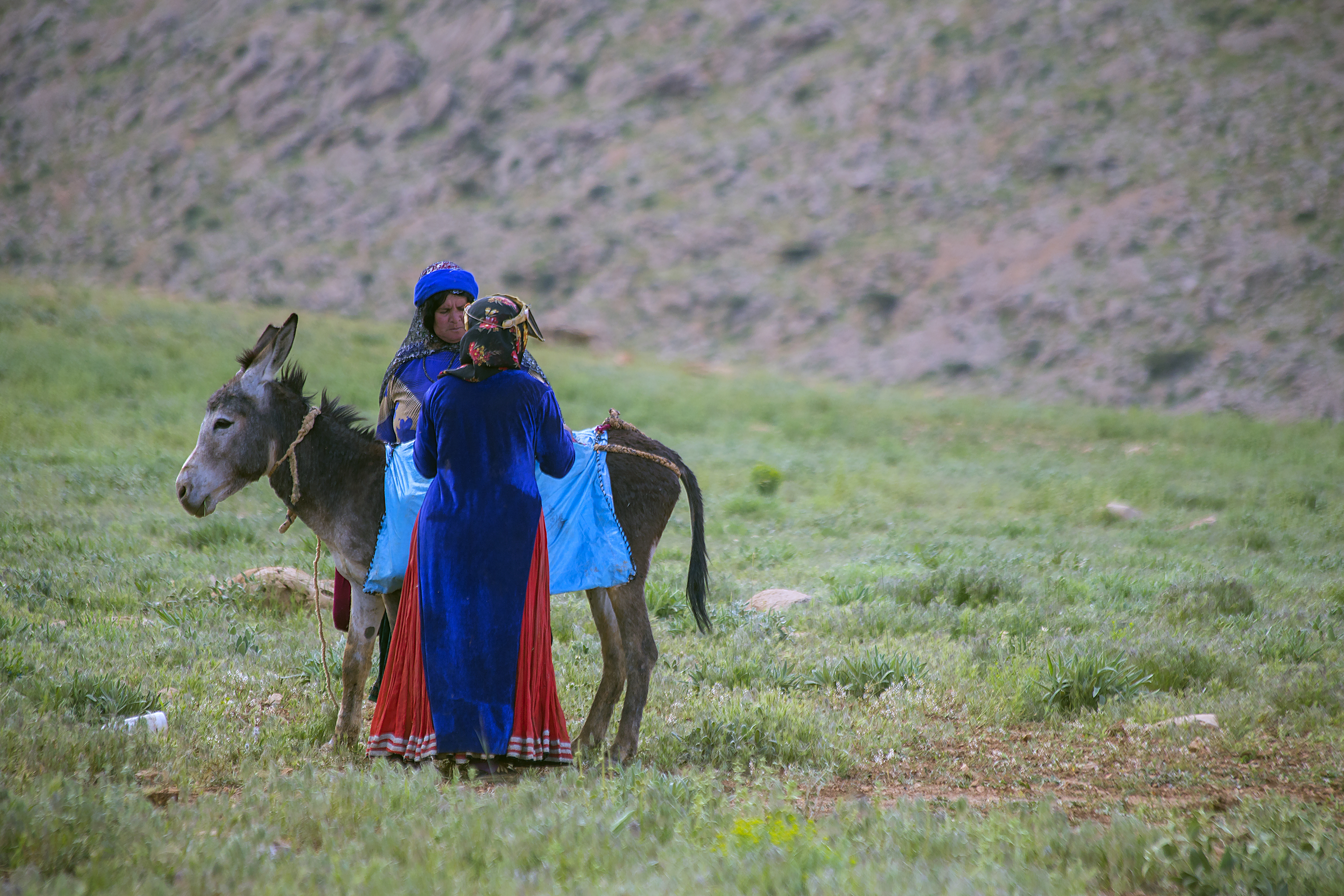 بعضی علت نامگذاری روستا را موقعیت توپوگرافی آن می‌دانند، به طوری که نام اولیه این روستا «خور» به معنای جای گود بوده و این نام به «حفر» و سپس به «خفر» تبدیل شده‌است. همچنین دو امامزاده در این روستا است. روایت دوم کلمه خفر را برگرفته از خور یا غور می‌داند. غور یا غوری نام قبیله یا مردمان اولیه‌ای می‌باشد که در این محل سکونت داشته‌اند. برخی نیز این لغت را برگرفته از گور یا گبر می‌دانند که خود آیینی قبل از اسلام را در منطقه معرفی می‌نماید. روستای خفر به «عروس دنا» نیز معروف است.